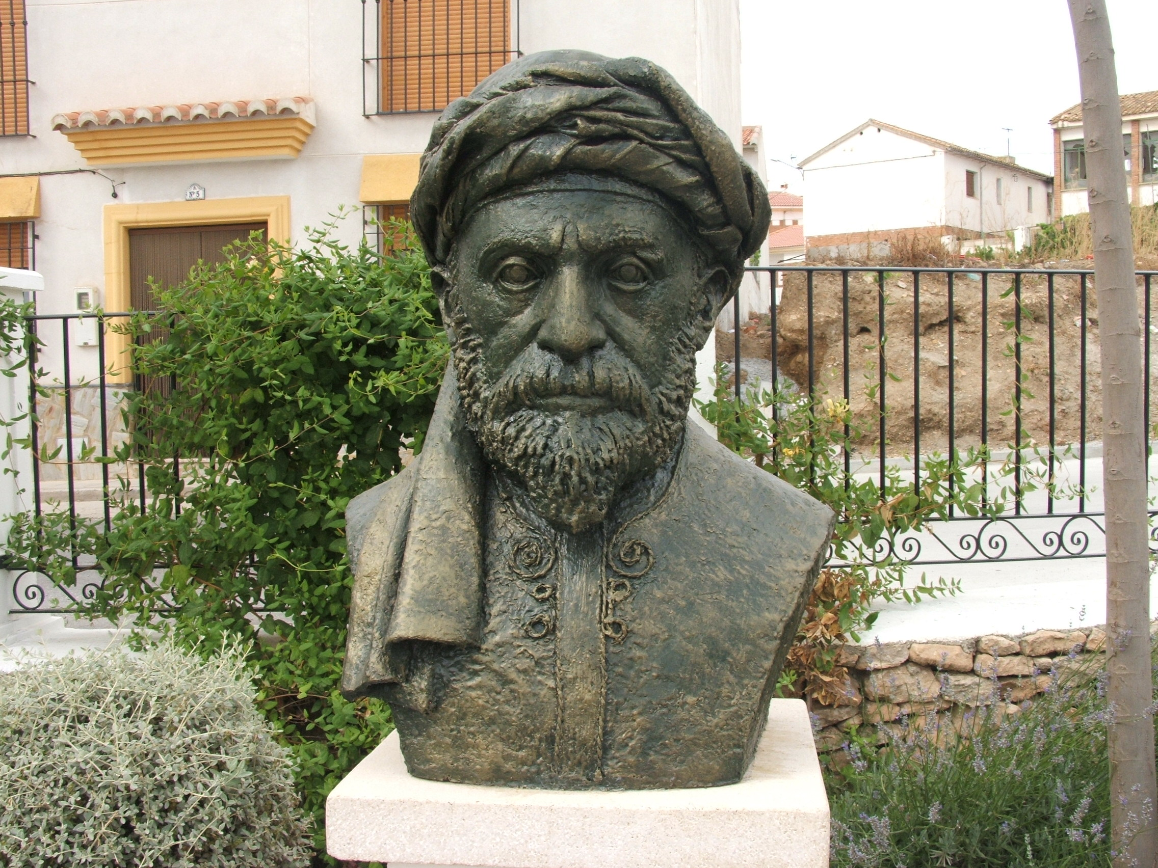 Busto del poeta Al-Xustari, tal y como estaba en el parque homónimo de Exfiliana (Valle del Zalabí, España). Acabó retirándose del lugar tras sufrir un acto vandálico.